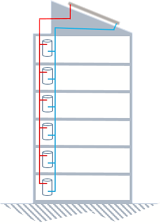 תרשים מערכת סולרית משותפת